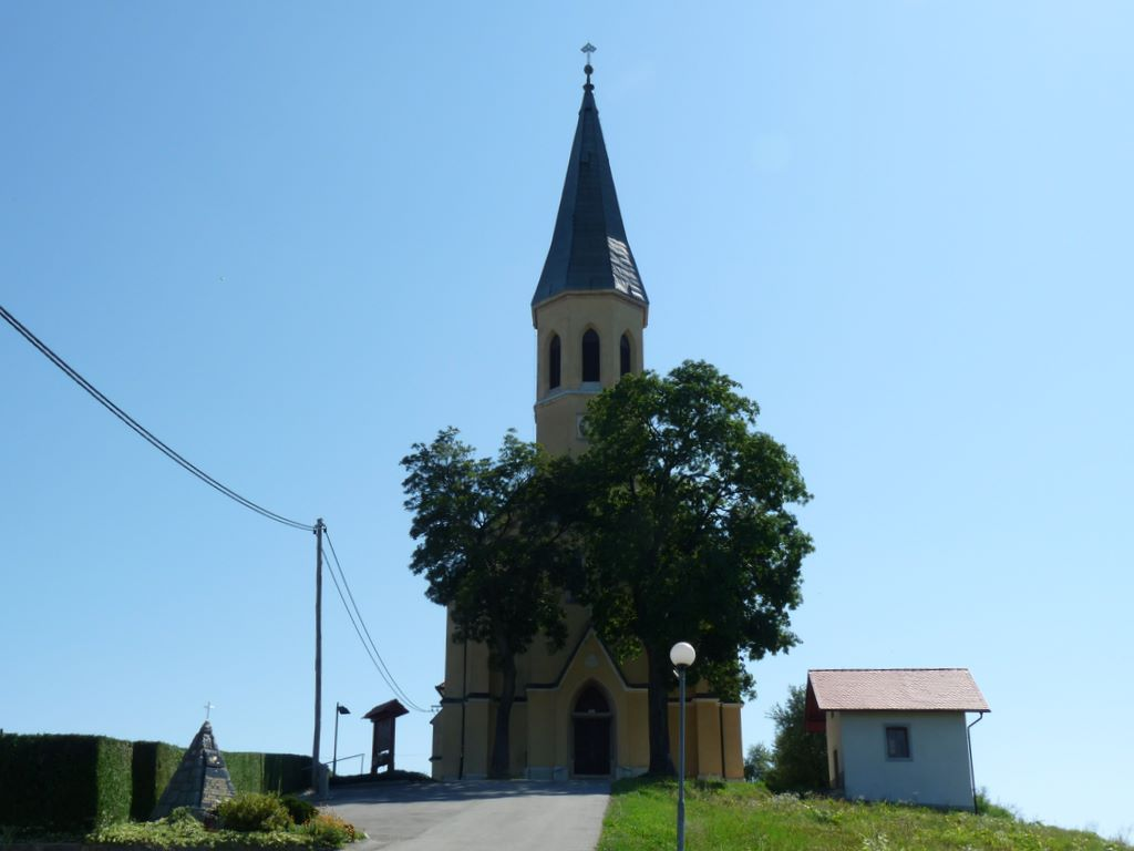 Sveti Duh na Velikem Trnu. Mali Trn, Občina Krško.